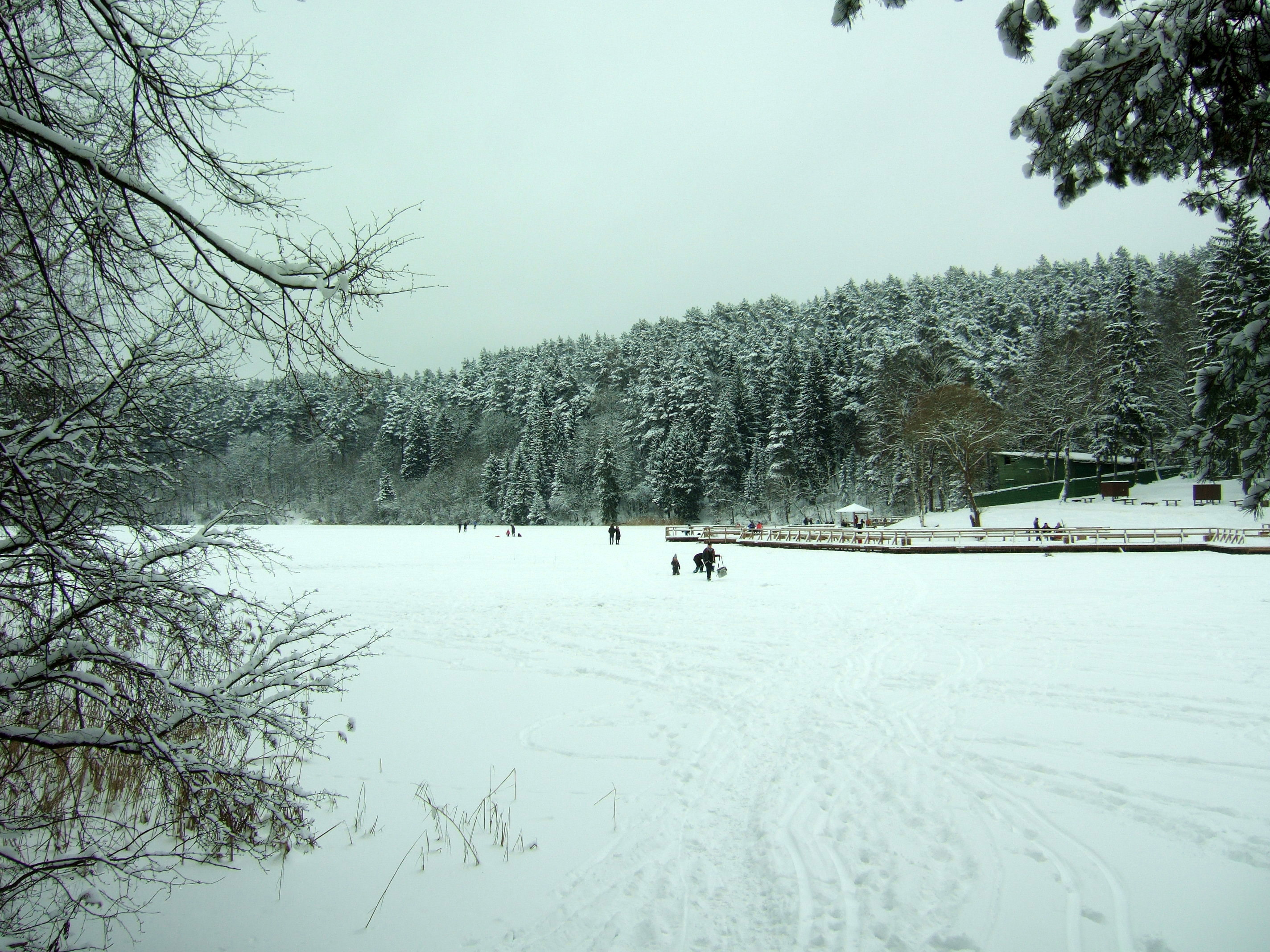 Užšalęs Balsio ežeras (Žalieji ežerai)